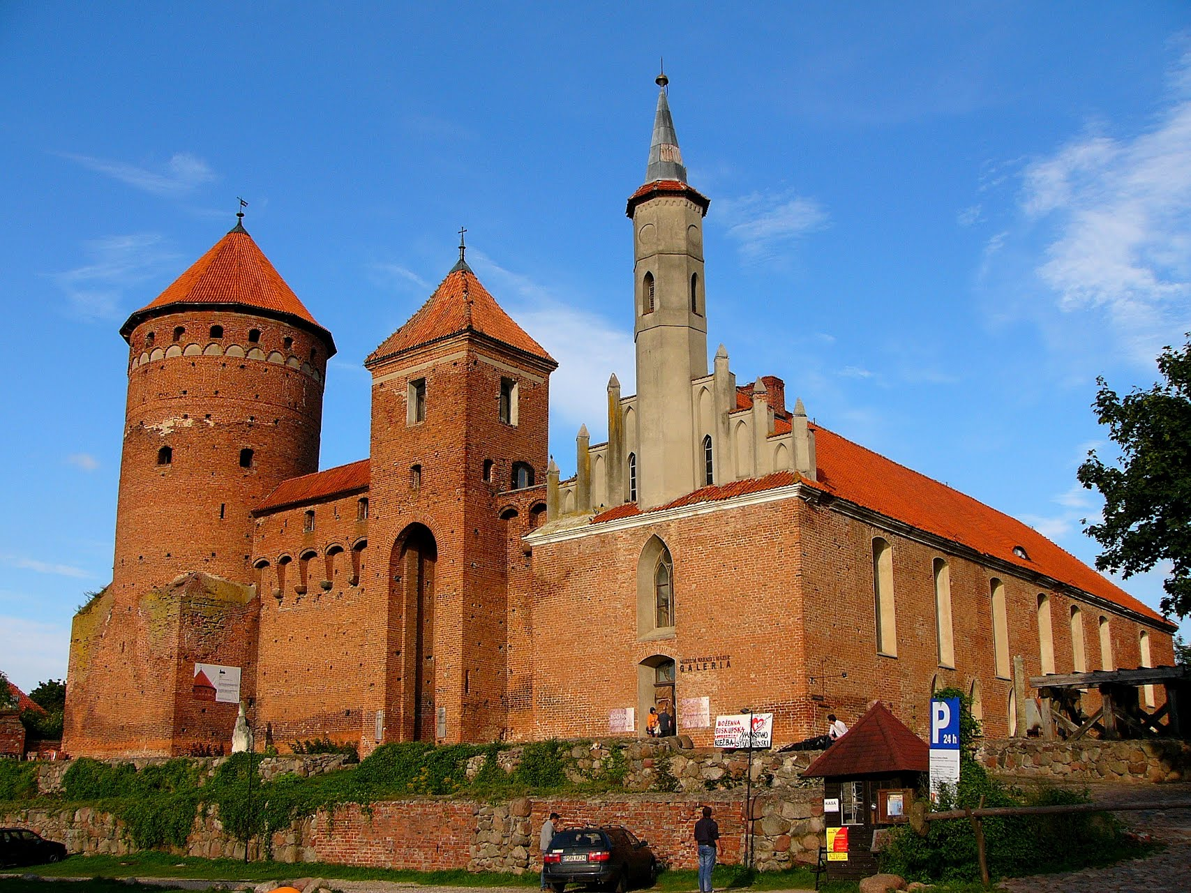 Reszel. Zamek biskupi z „wbudowanym“ kościołem.